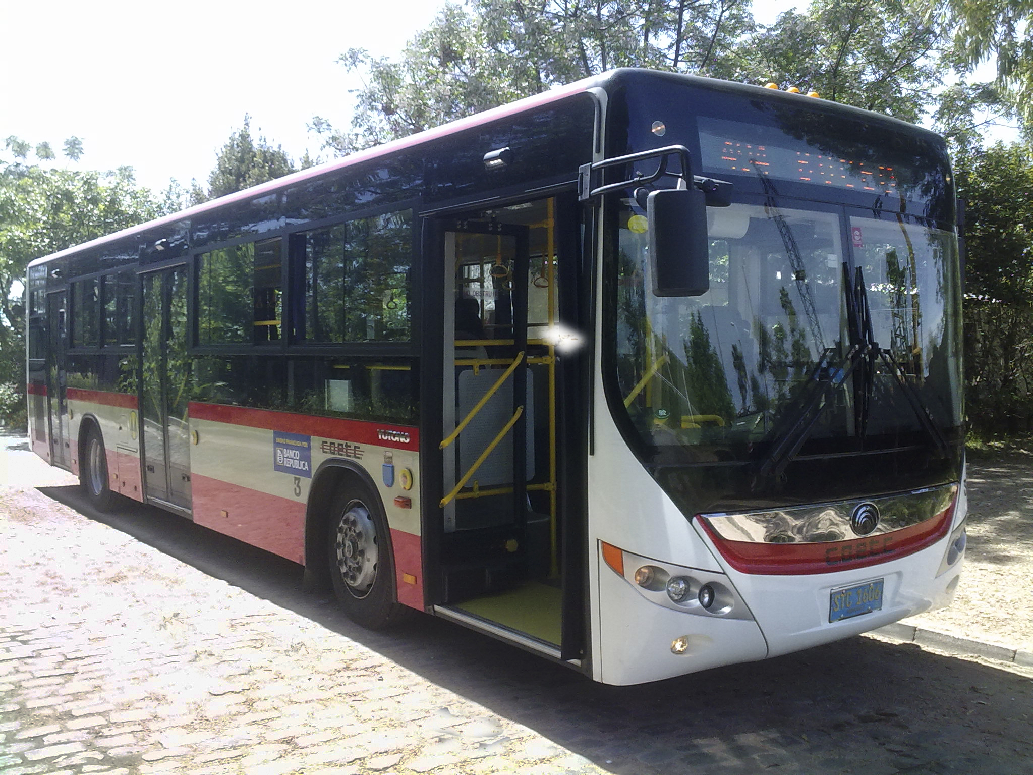 Coche 3 de la empresa COETC, marca Yutong, modelo ZK6126HGA, puesto en circulación el 7 de Octubre de 2013.